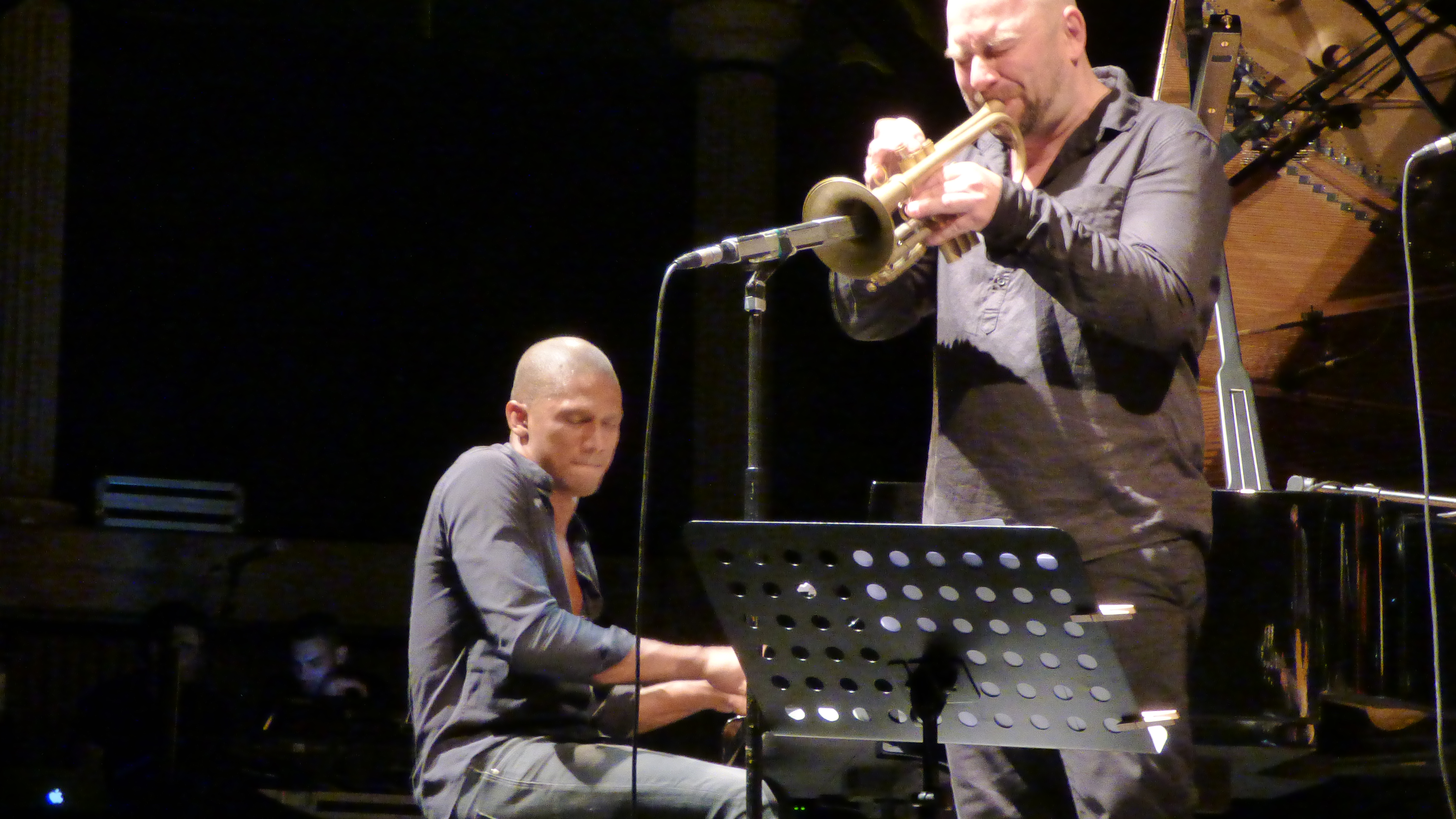 Lars Danielsson New Quintent, actuación en la XIX edición del Festival Internacional de Jazz de San Javier, 1 de julio de 2016